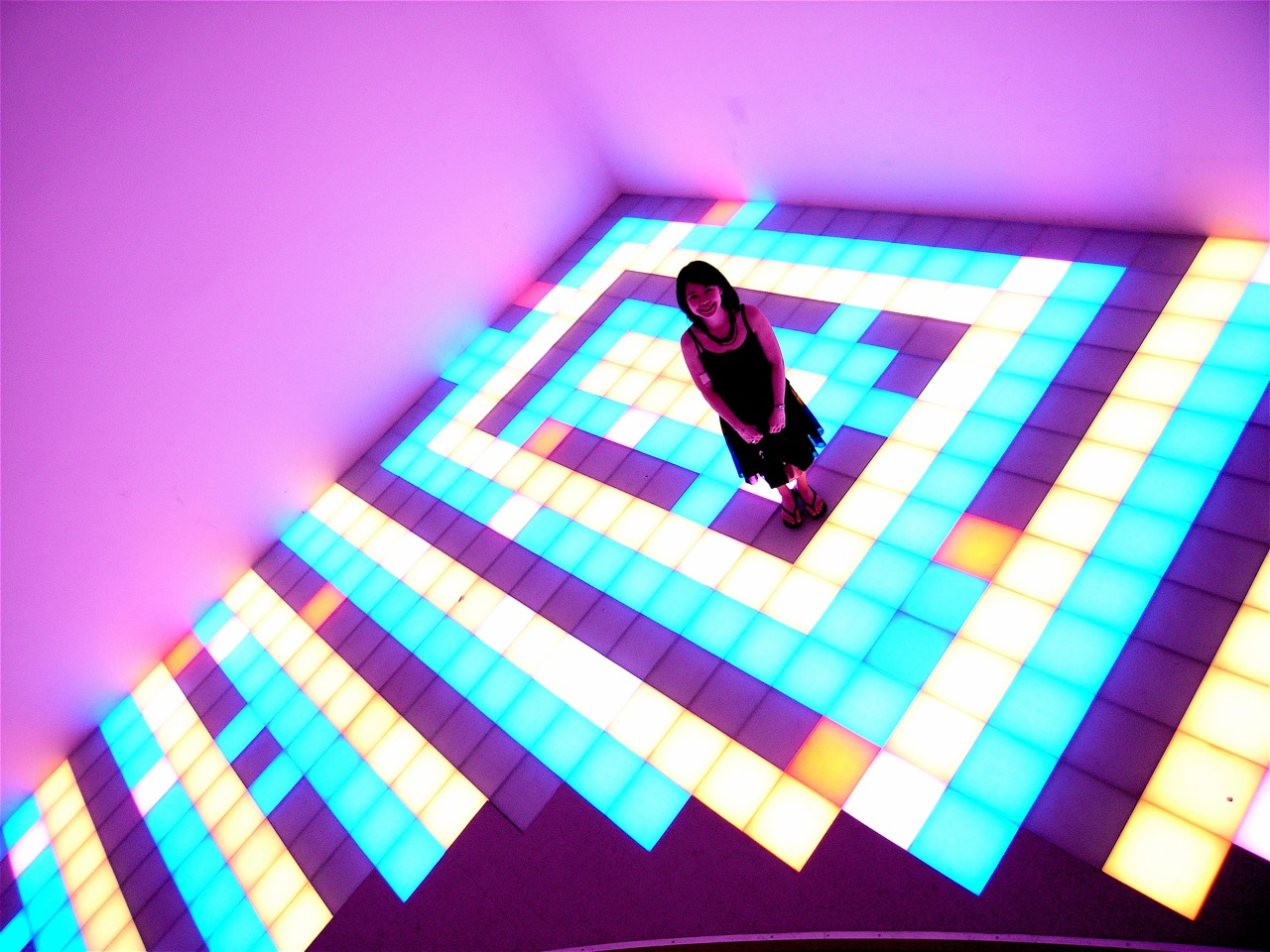 Illuminated dance floor